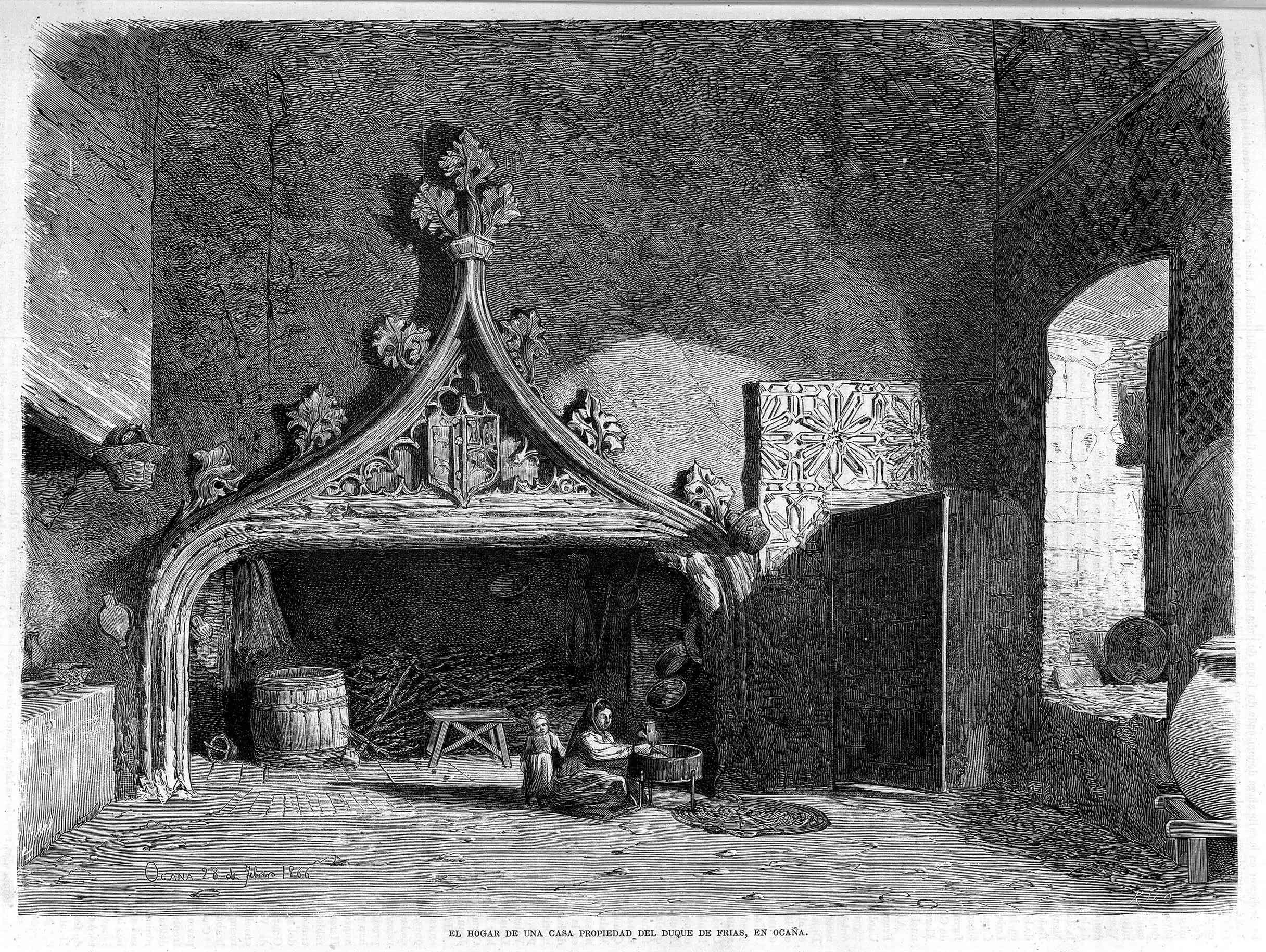 El hogar de una casa propiedad del duque de Frías, en Ocaña.